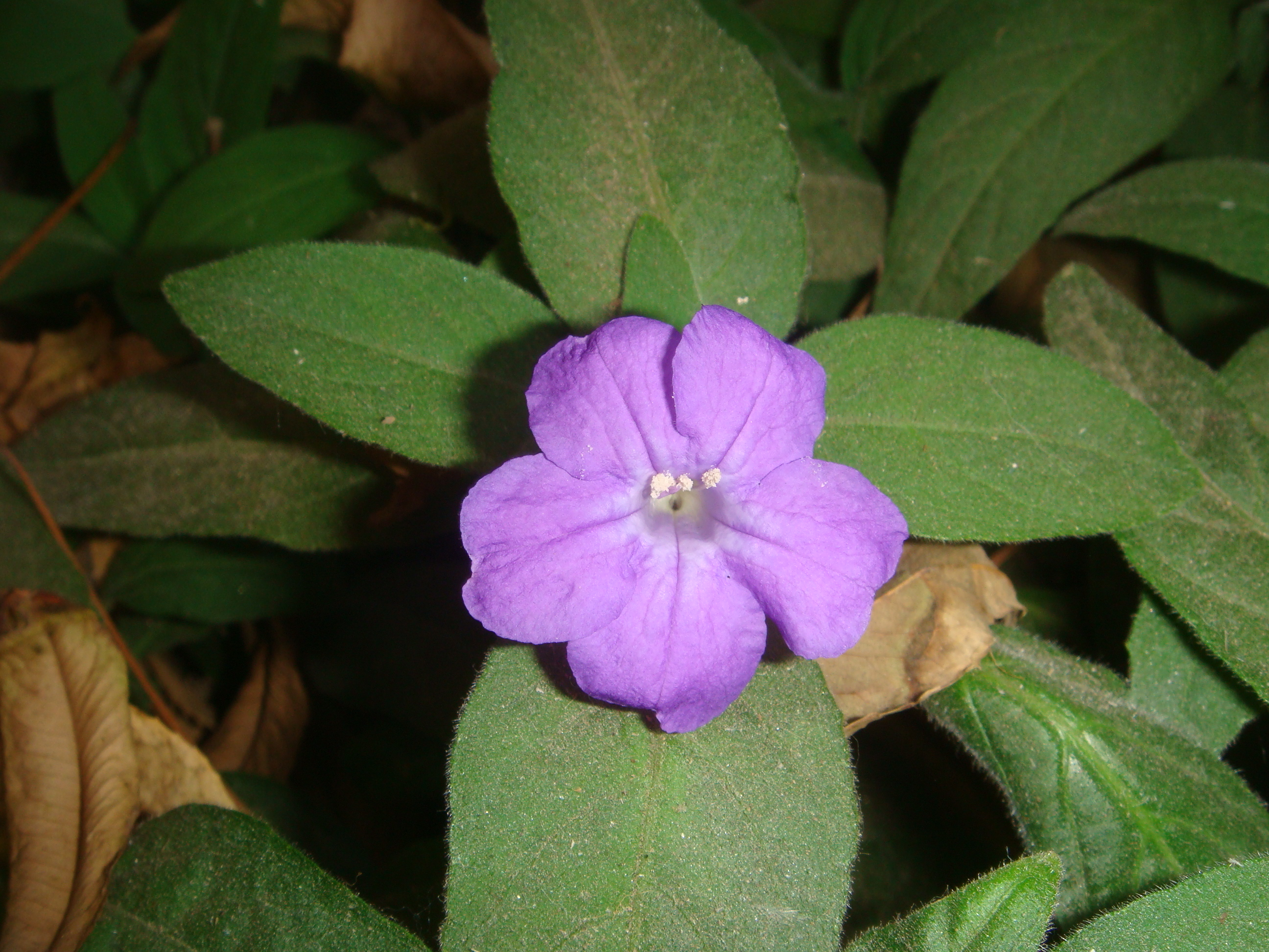 Ruellia humilis, cultivated, Arizona State University, Tempe, Arizona